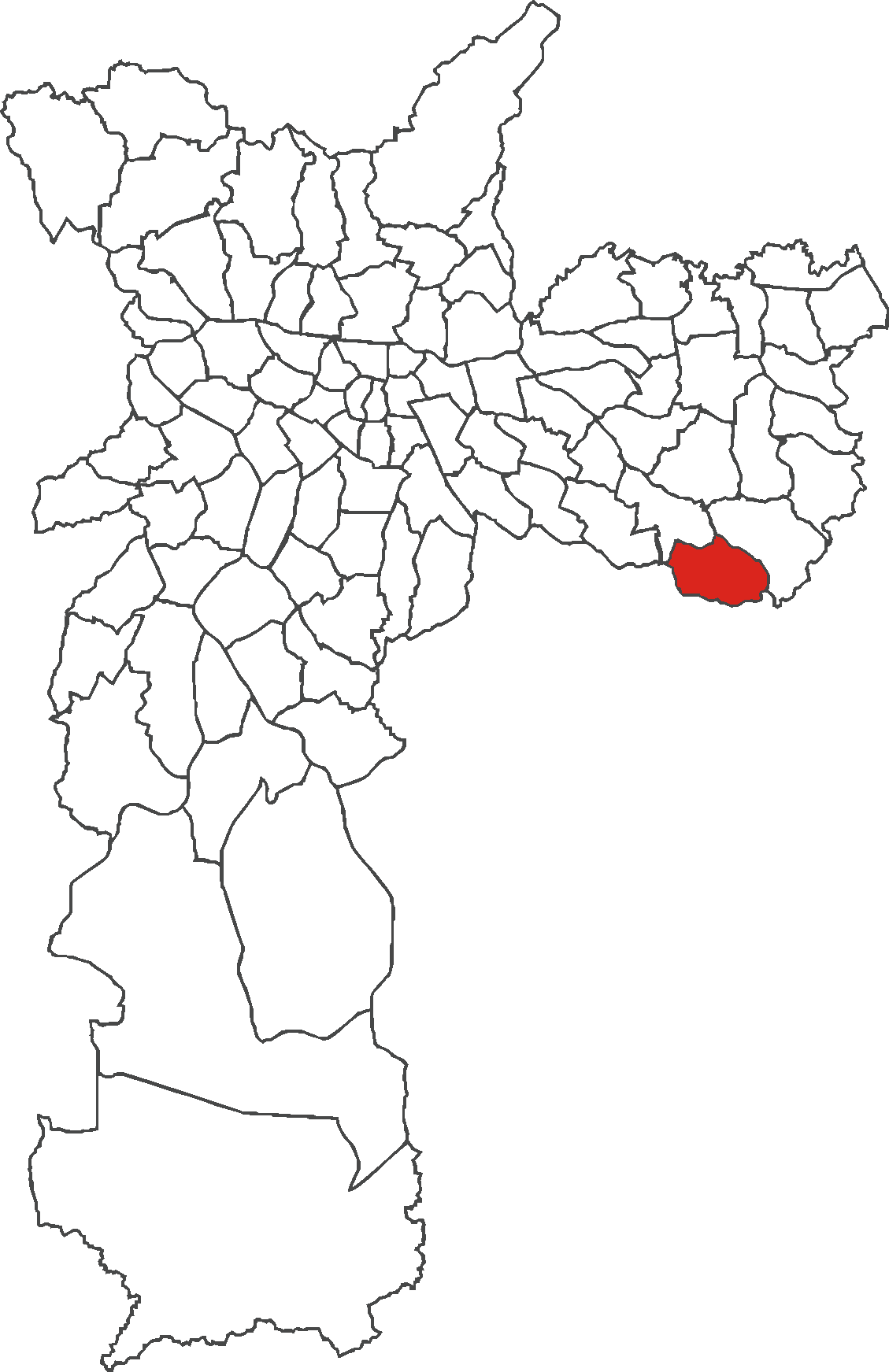 Localização do distrito de São Rafael no município de São Paulo.